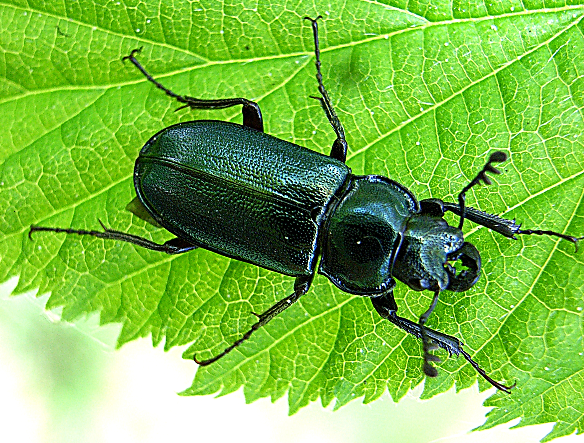 Platycerus caraboides